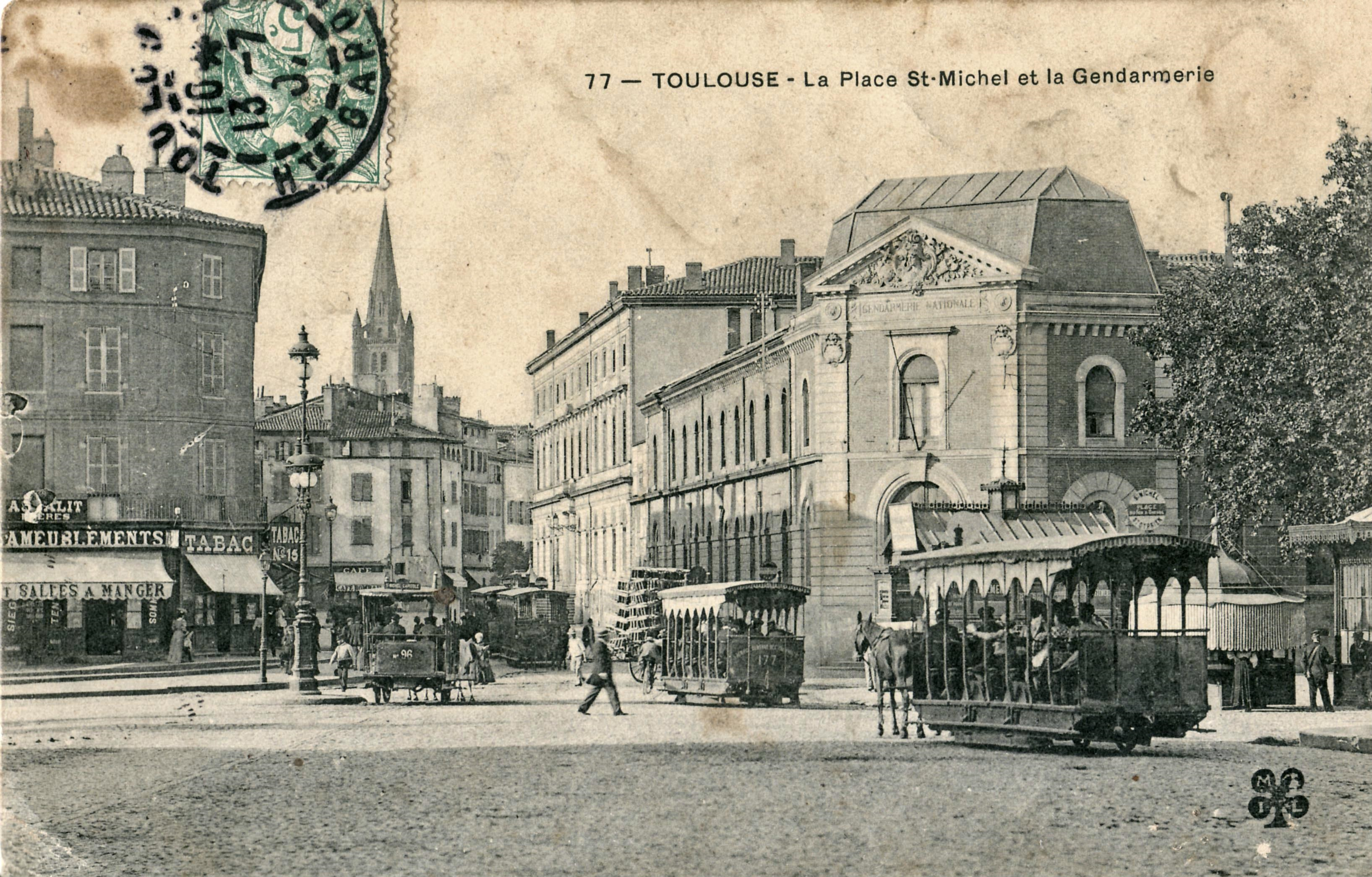 Carte postale ancienne éditée par %TIL, n°77 :TOULOUSE - La place St-Michel et la Gendarmerie